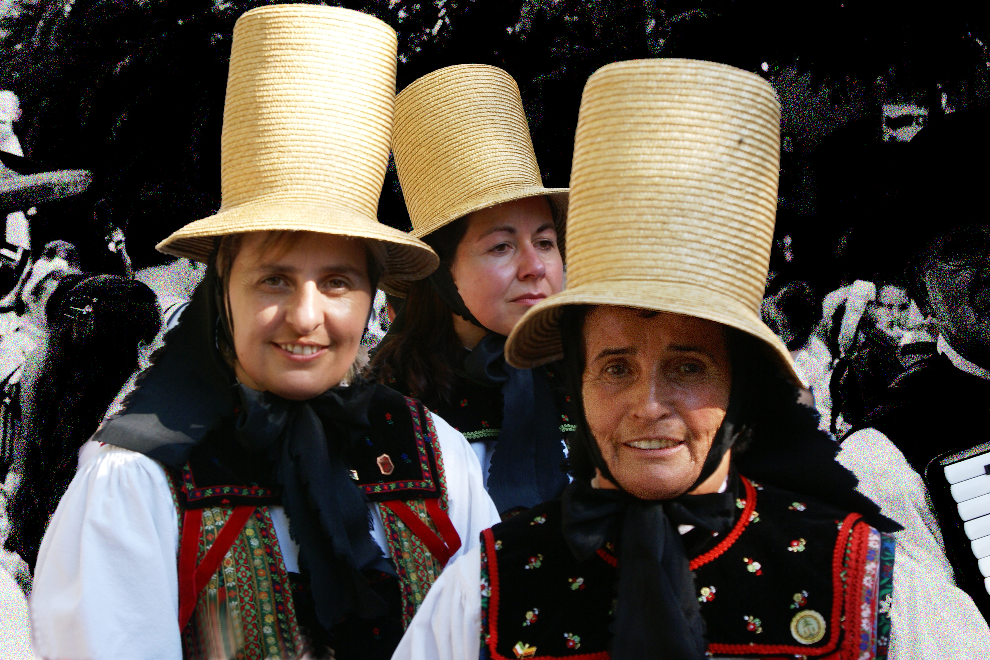 Schonacher Frauentracht